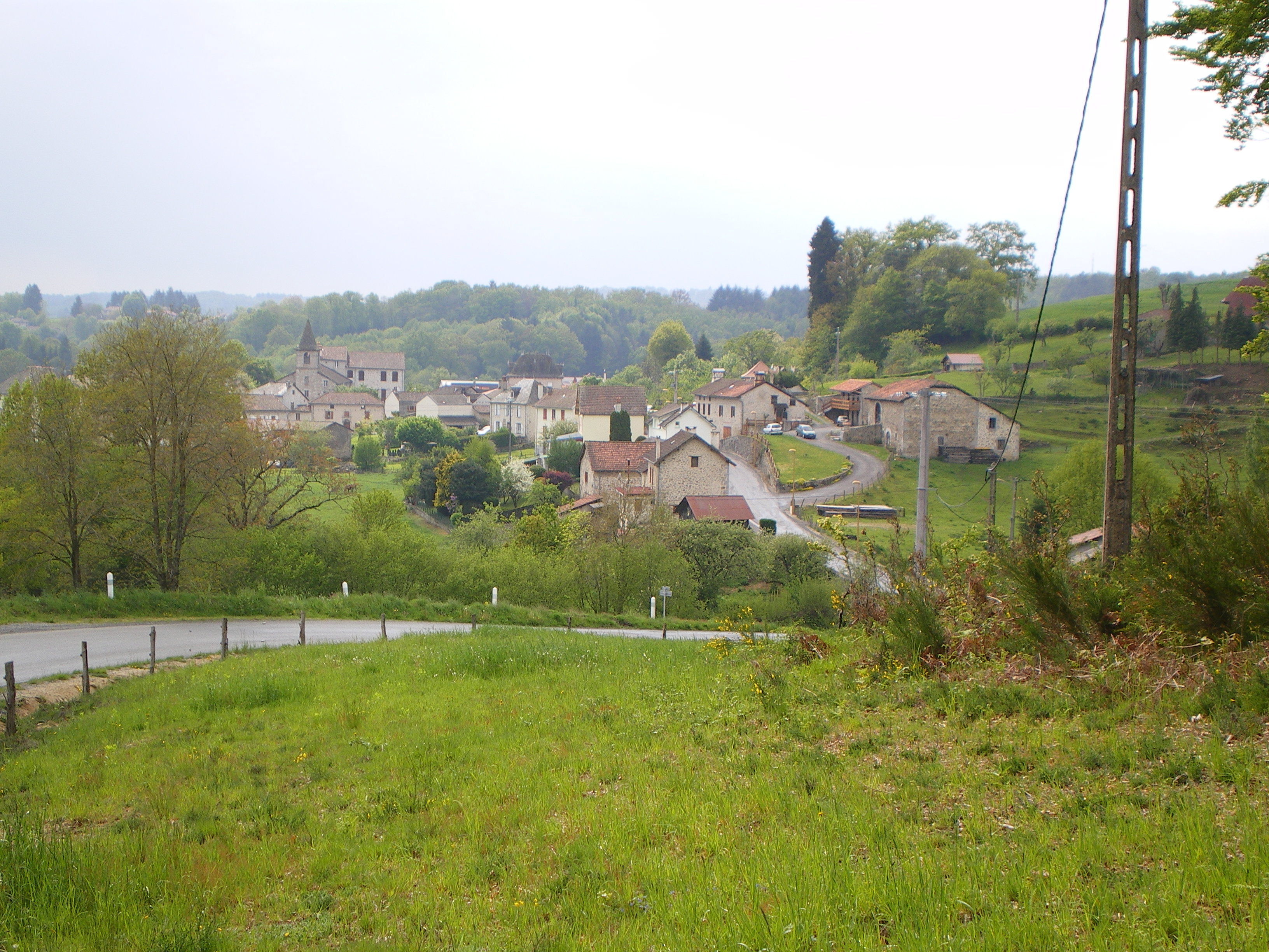 Parlan, Cantal, France